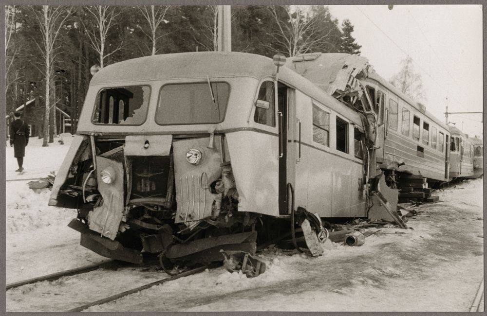 BJ Hinsnoret olycka 1957 KDAE13876